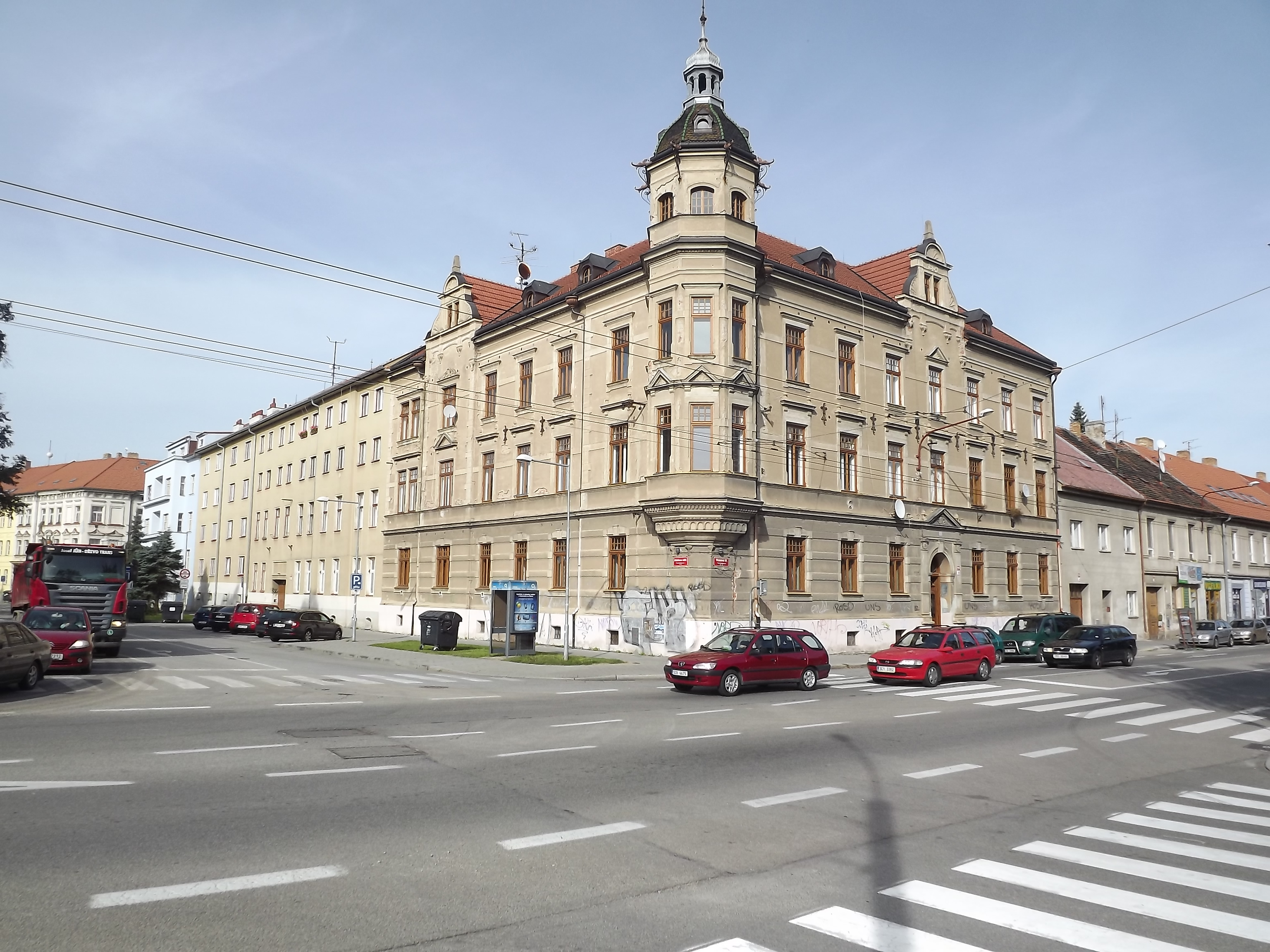 měšťanský dům, nábř. Jiráskovo, Husova 1844/26, České Budějovice